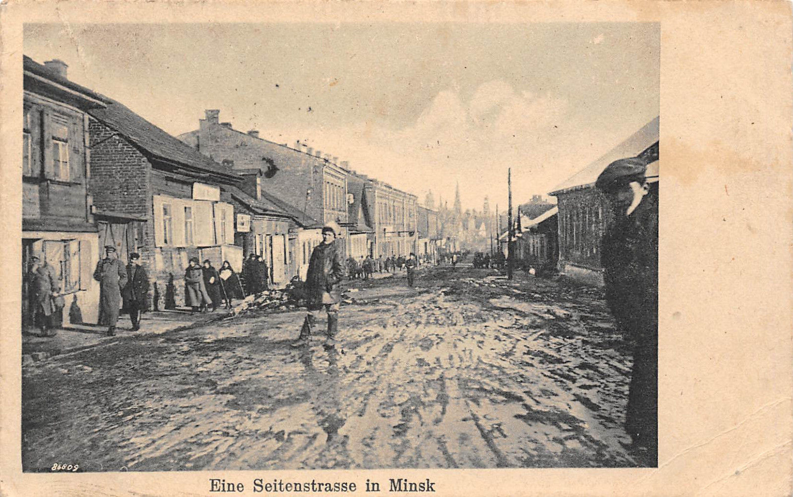 Беларуская (тарашкевіца): Менск (Miensk), вуліца Ракаўская (vulica Rakaŭskaja).